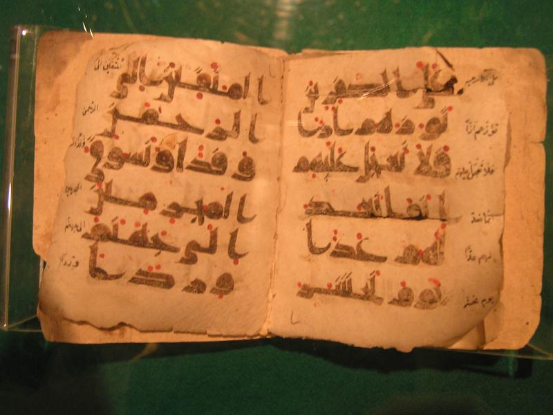 au Melvana à Konya très ancien Coran en peau de gazelle à écriture archaïque carrée